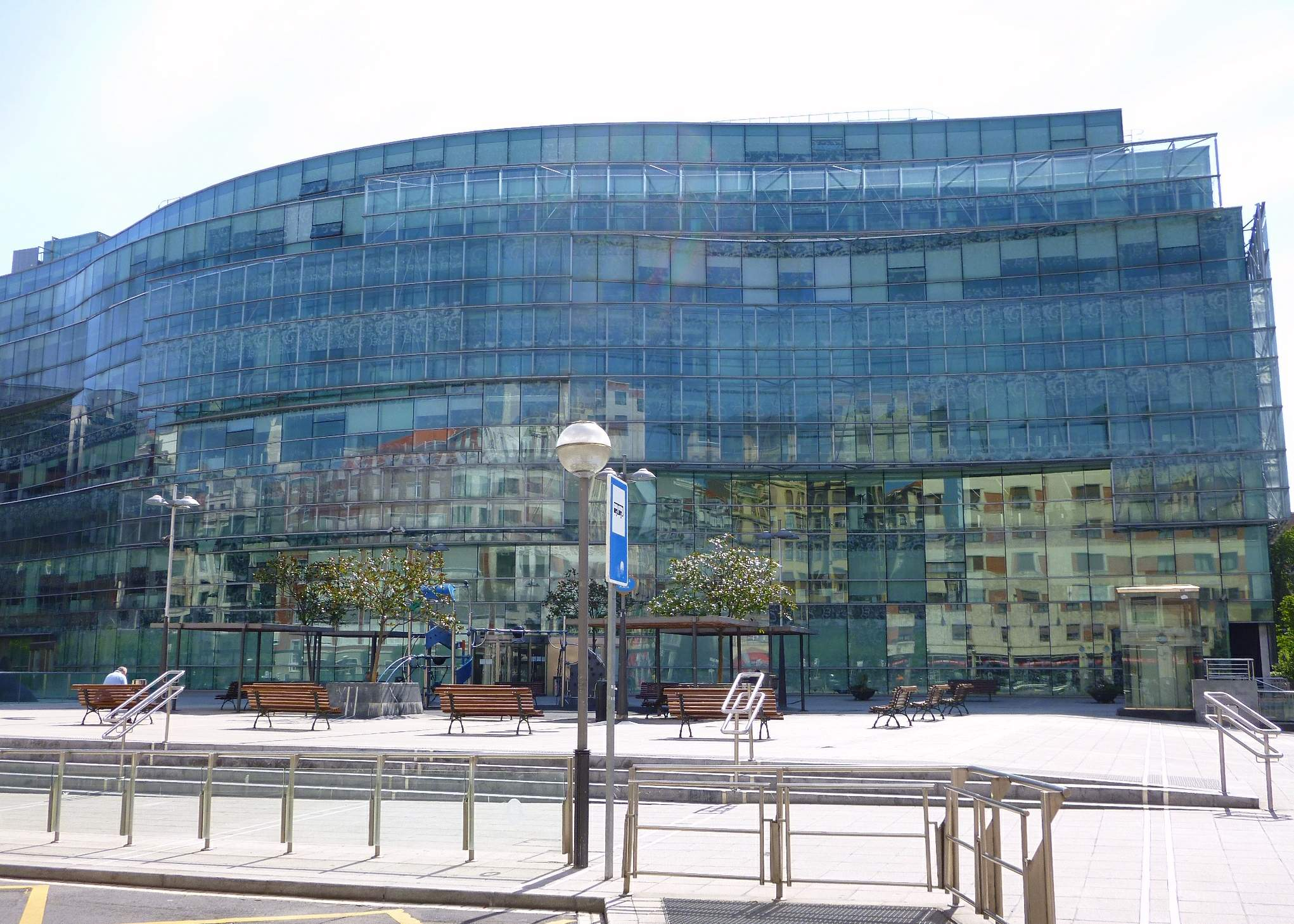 Edificio Plaza Bizkaia (Oficinas del Gobierno Vasco), en Bilbao